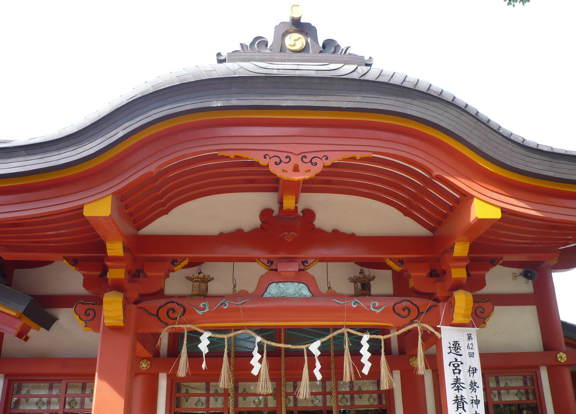 大隅神社の本堂